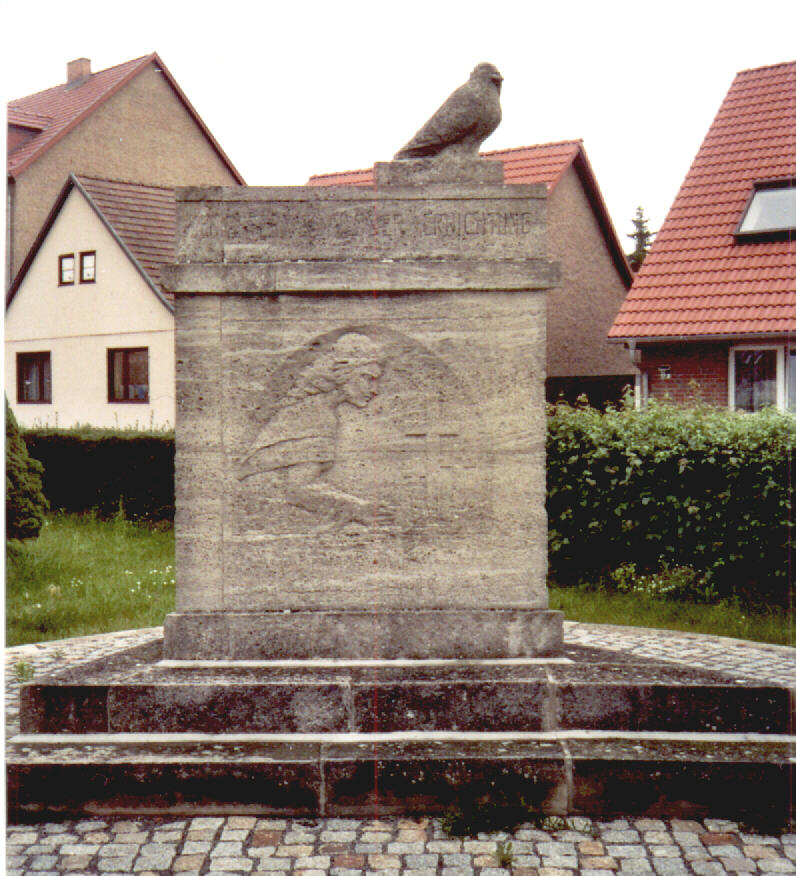 Gefallenendenkmal in Storkow/Mark, Deutschland.